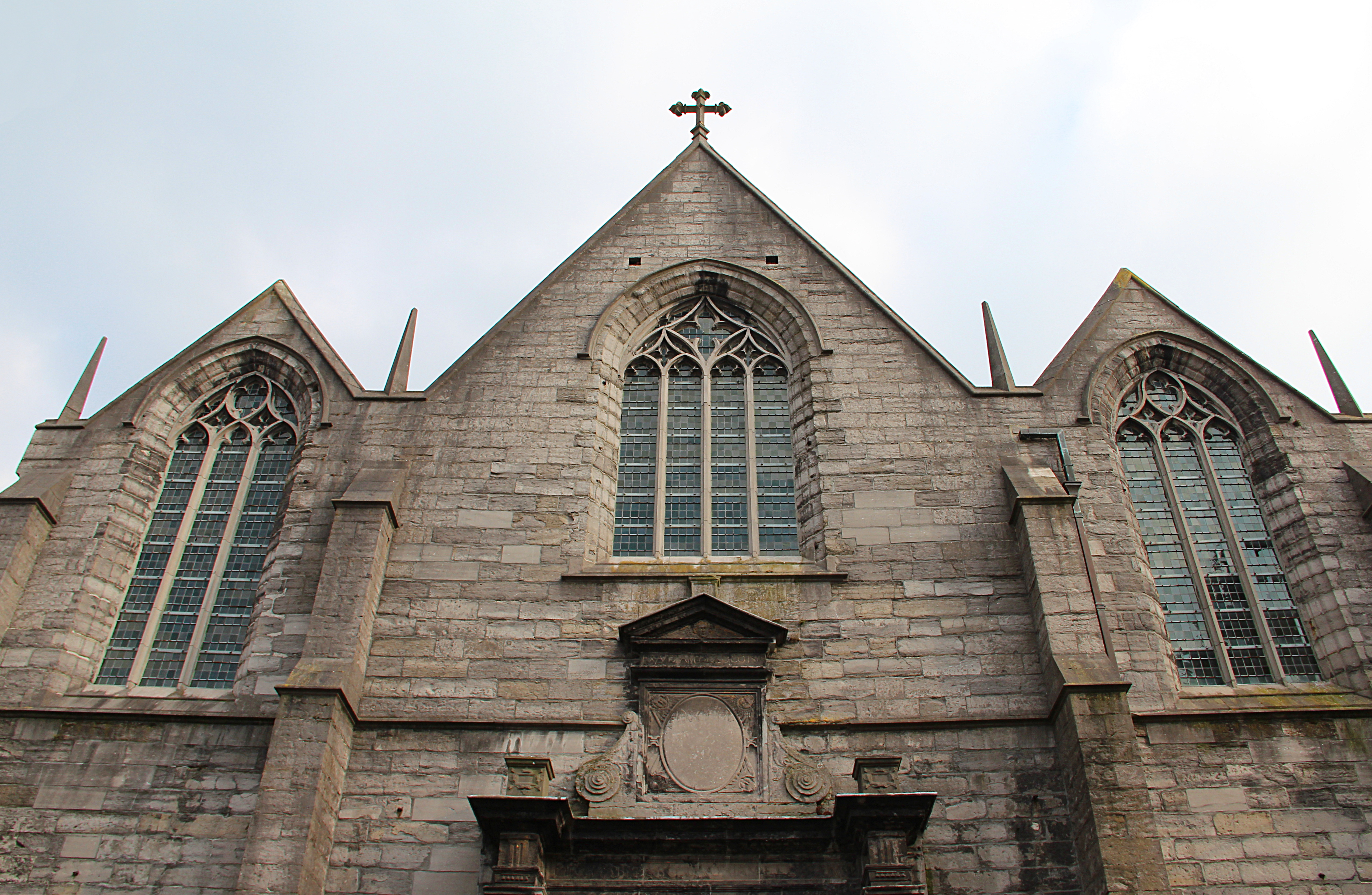 Tournai (Belgique), rue des Jésuites, 28 - L'église-halle du Séminaire édifiée entre 1601 et 1604 suivant les plans du frère jésuite tournaisien Henri Hoeimaker).